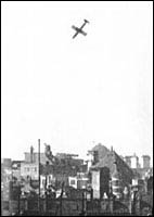 Fall of a V1 missile / V-1 bombe faller ned over London.